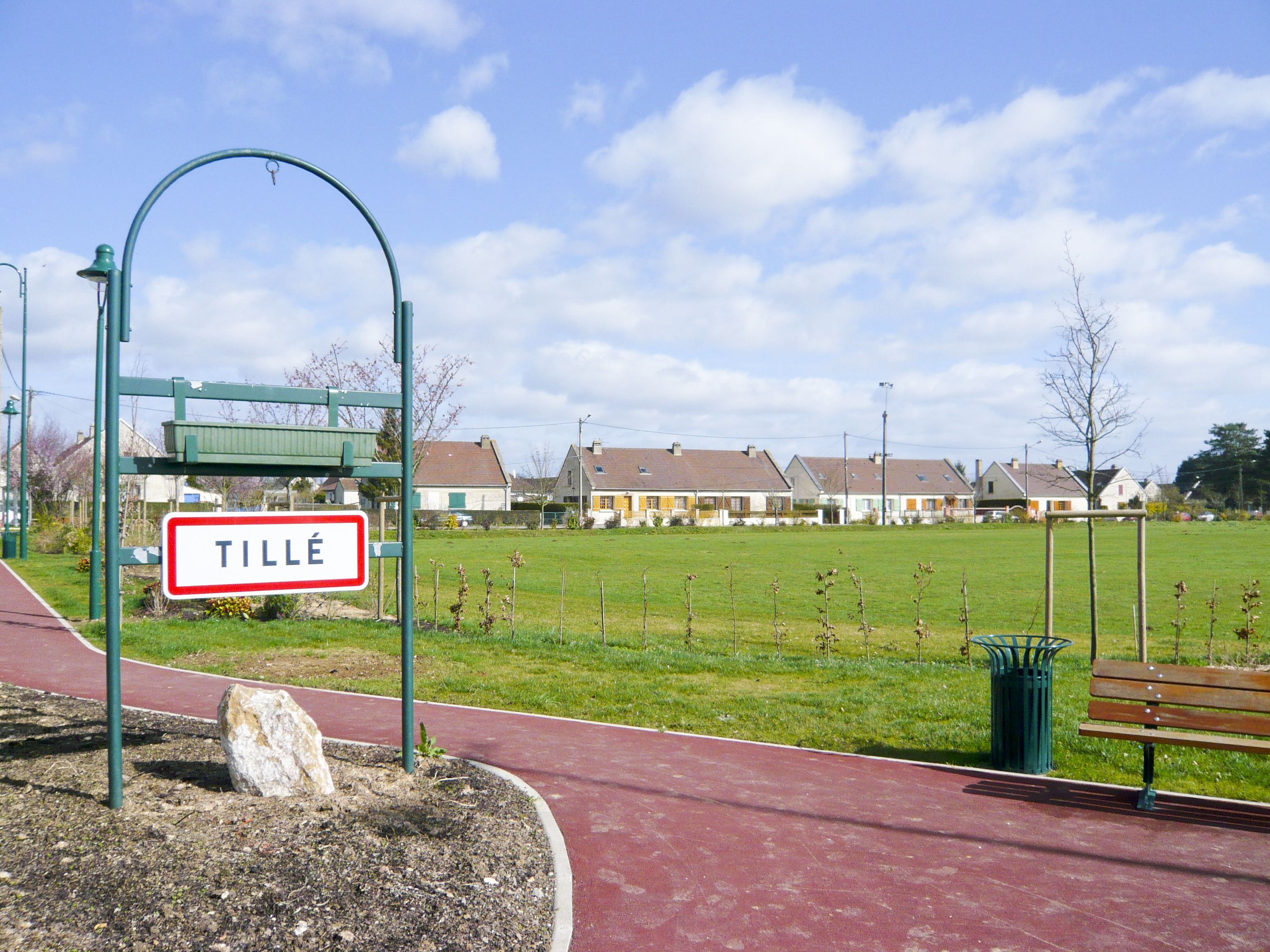 Tillé, France